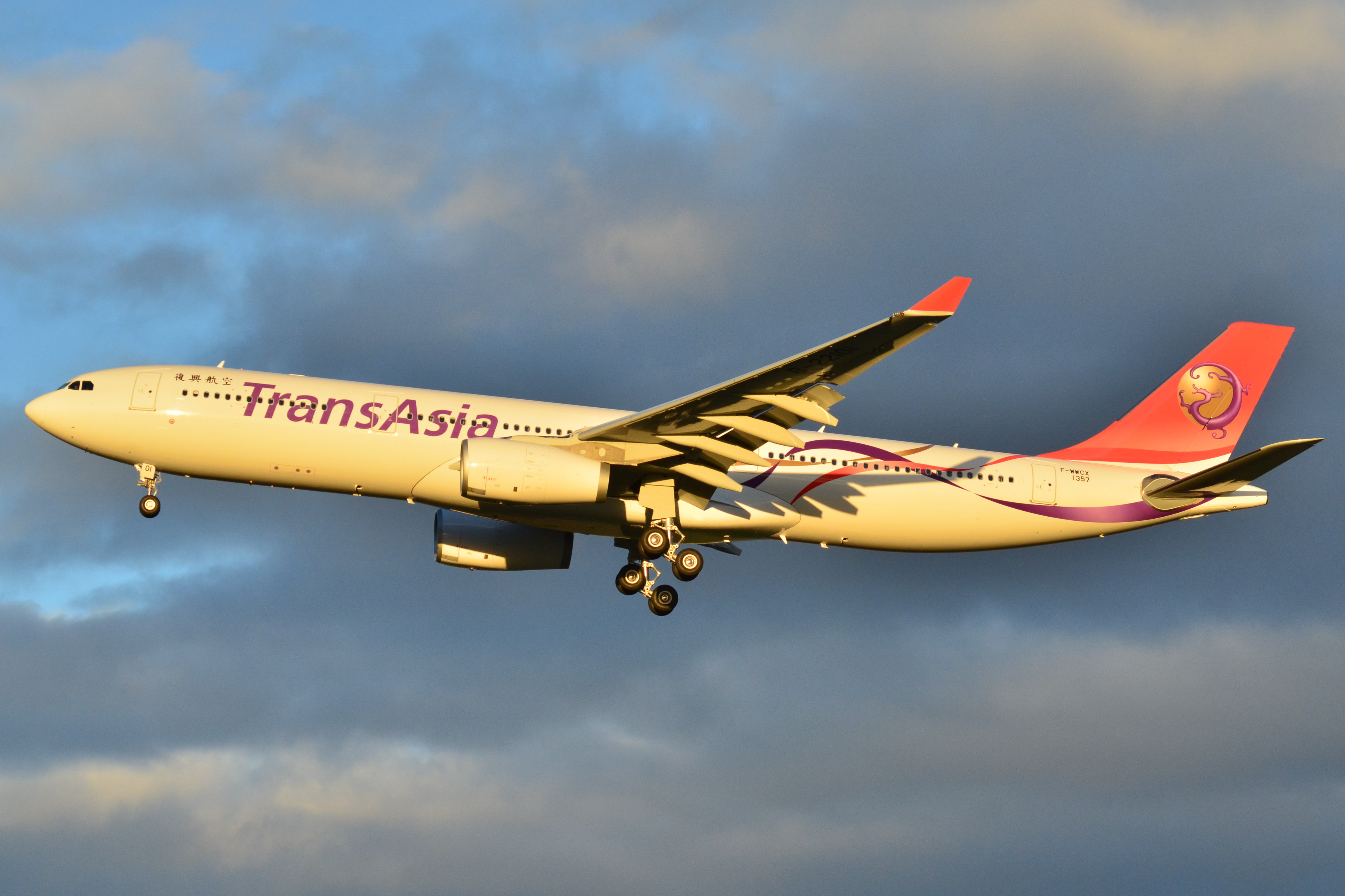 Photo prise à l'aéroport de Toulouse-Blagnac (LFBO) en France. Picture take at Toulouse-Blagnac Airport (LFBO) in France.